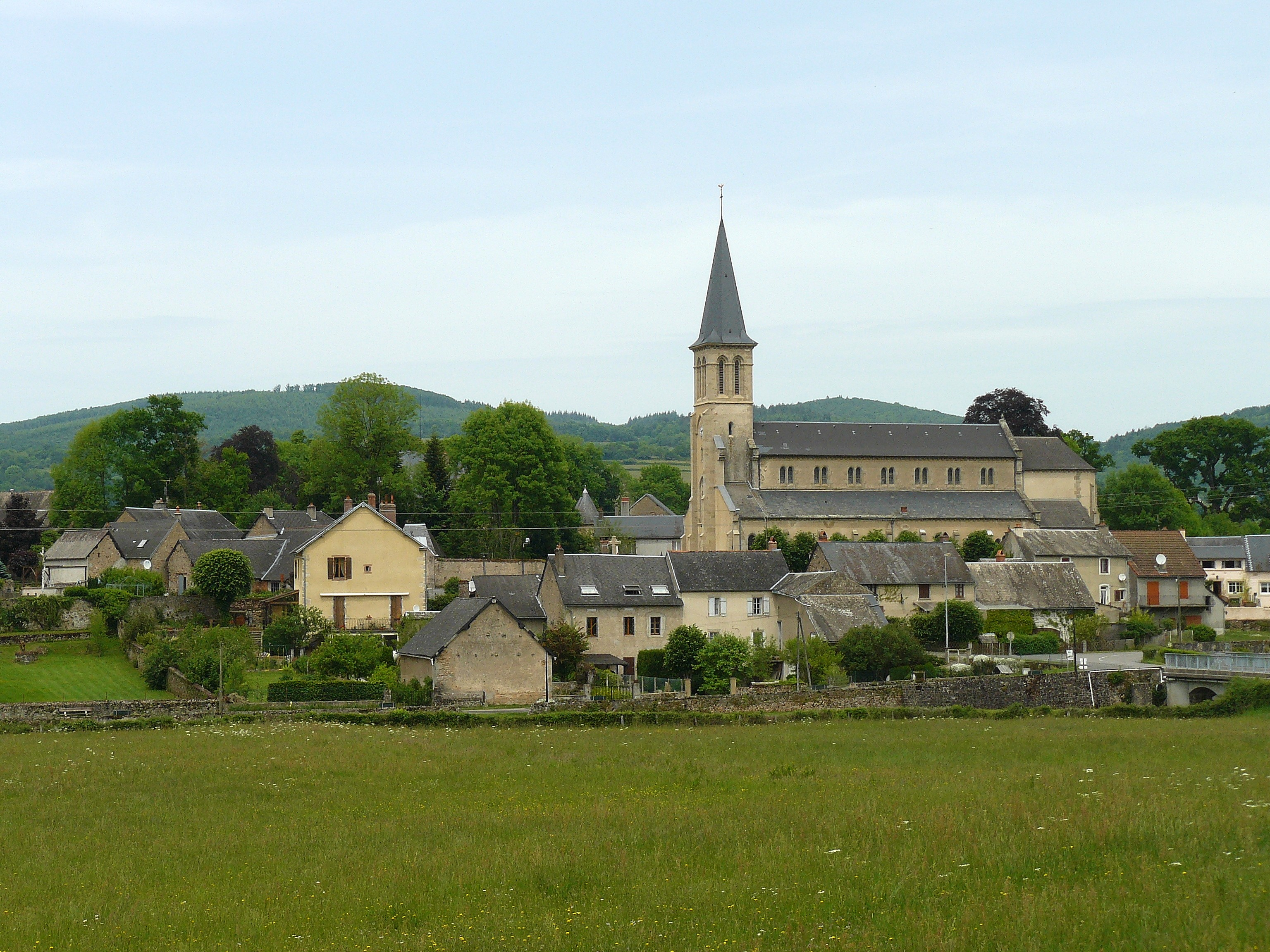 La Grande-Verrière (Saône-et-Loire, France)